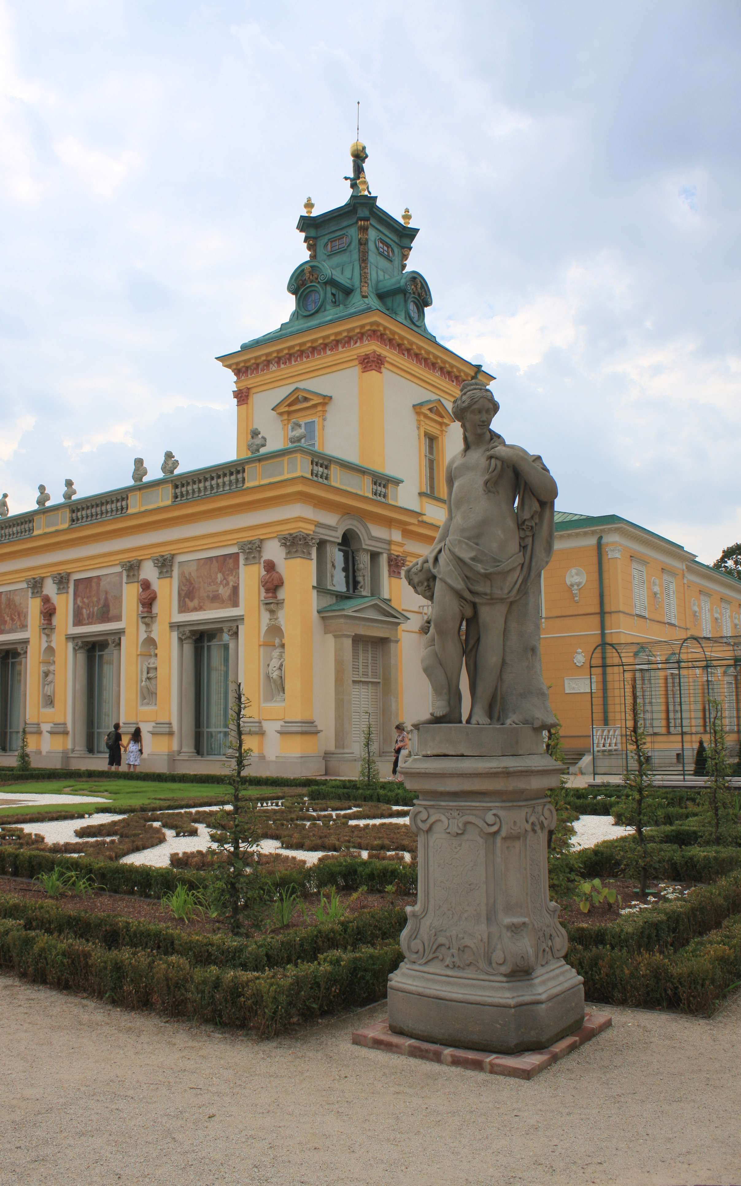 Wilanów, zespół pałacowo-ogrodowy, pałac Królewski, XIX